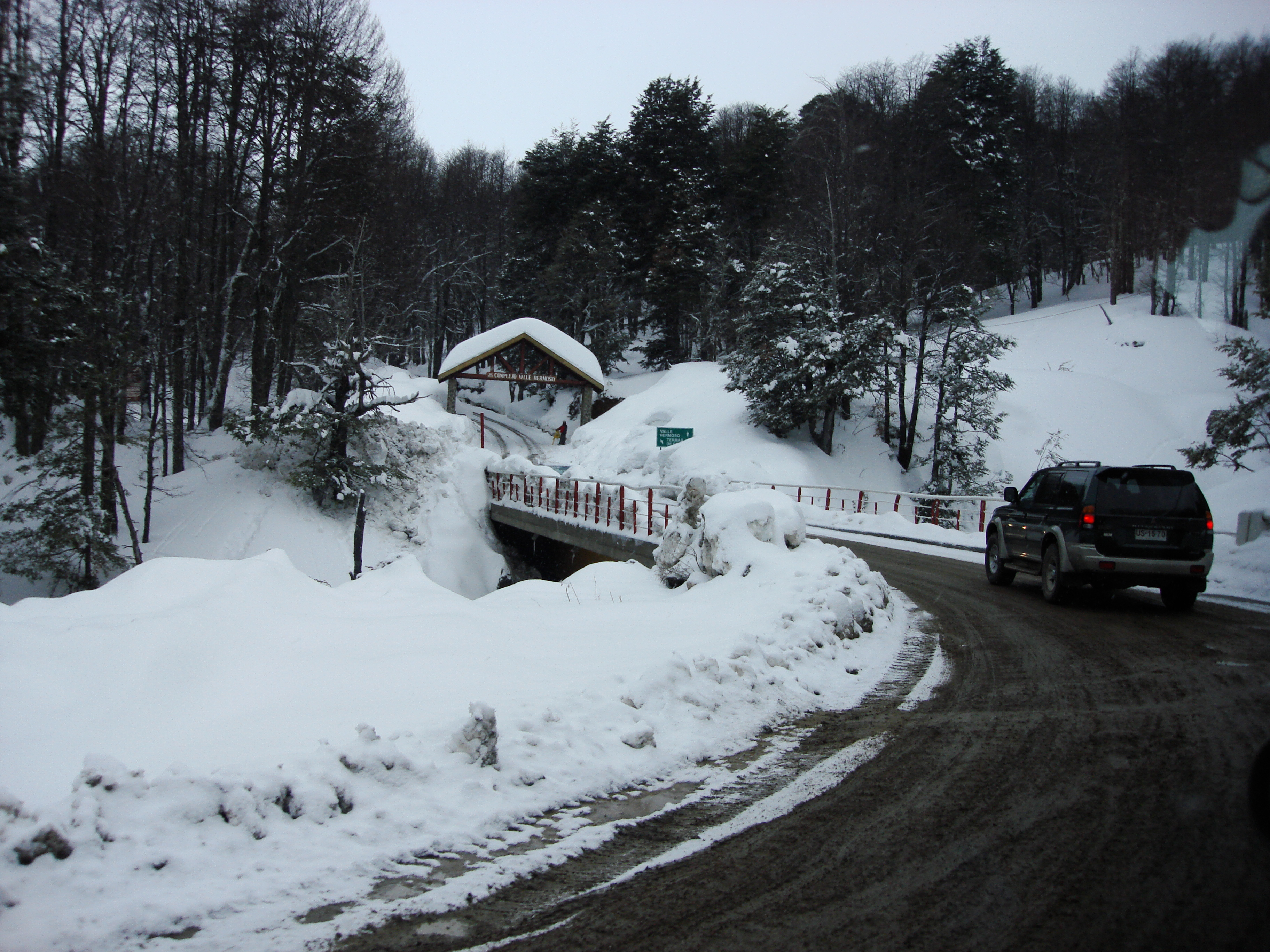 Camino Hotel